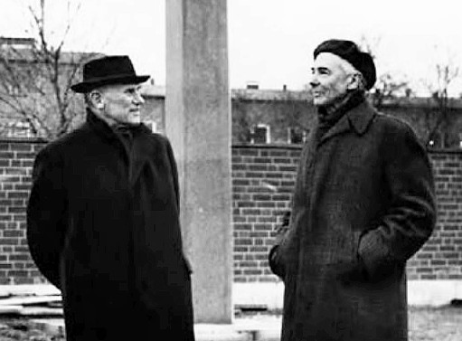 Arkitekt Ture Ryberg (t.v.) och skulptören Erik Grate